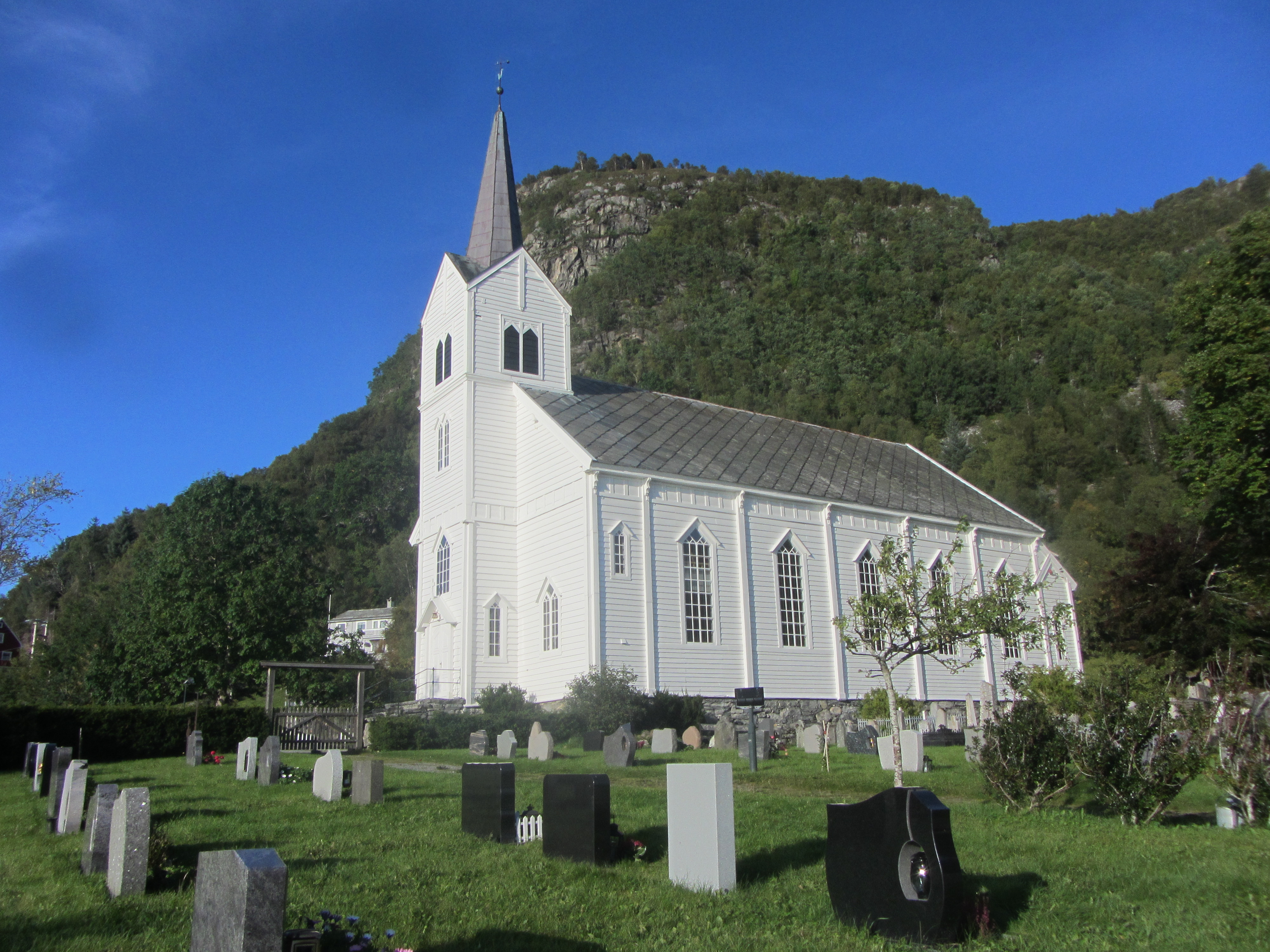 Selje kirke 16. september 2014